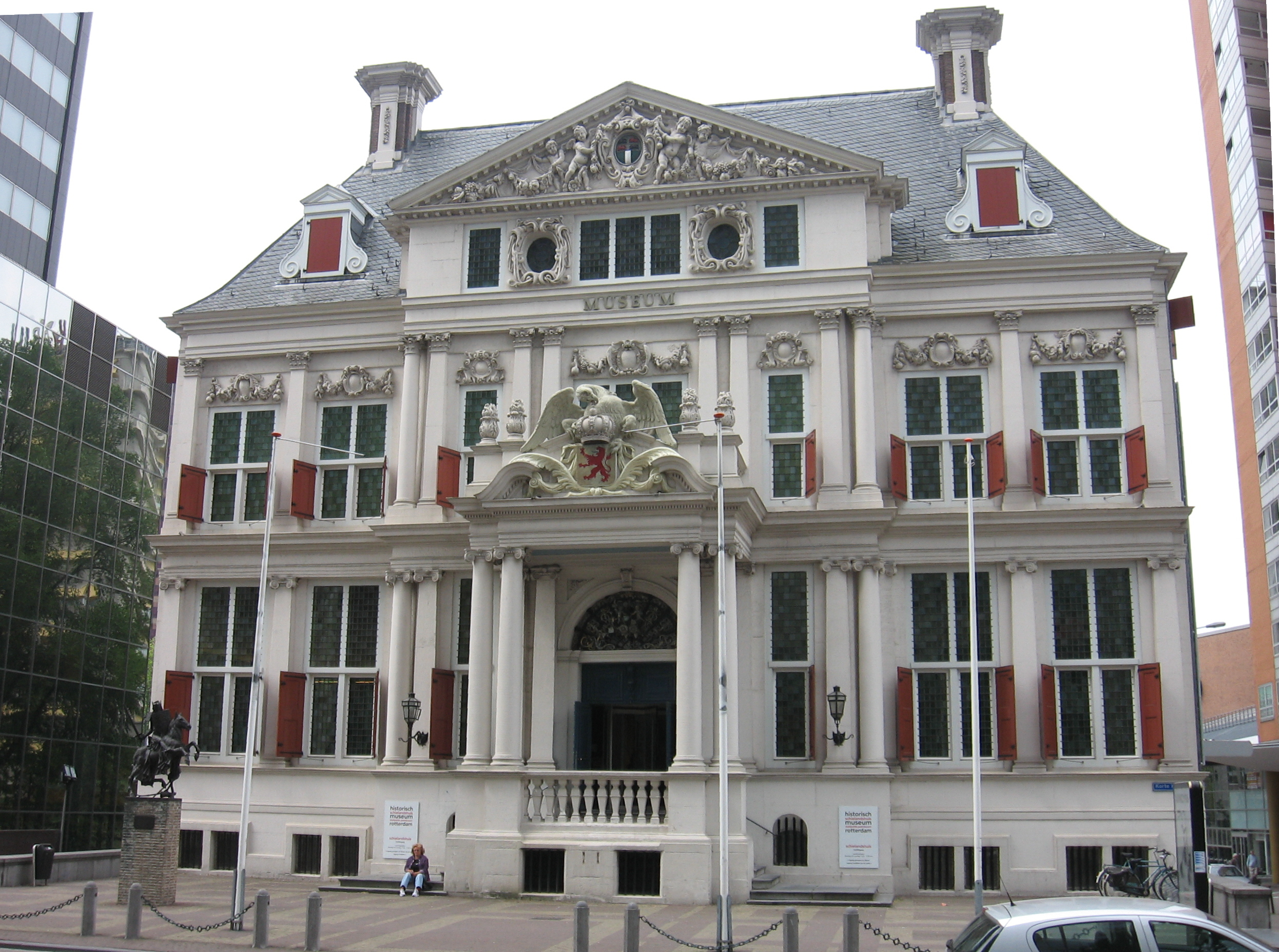 Schielandshuis, korte hoogstraat, Rotterdam